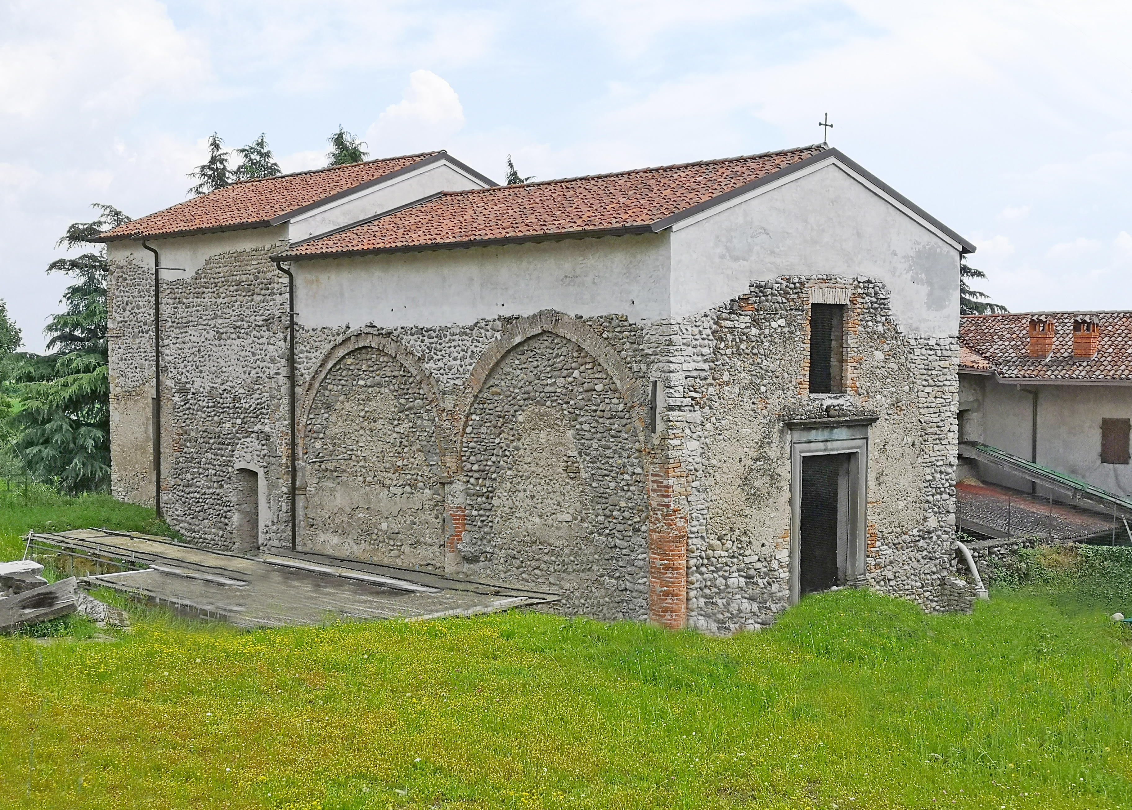 Pieve di San Bartolomeo, Bornato